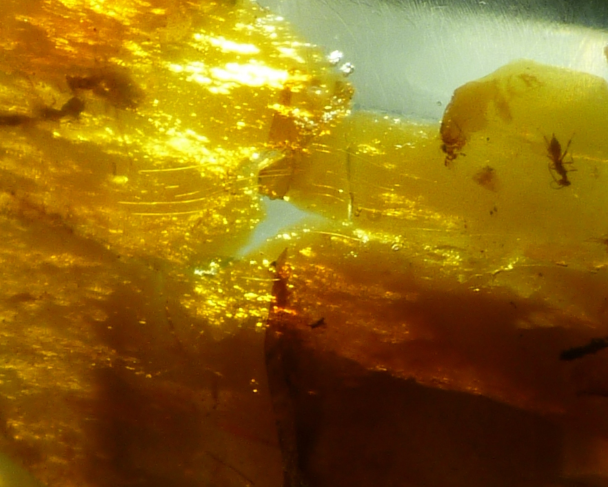 Muestra de ámbar pulido, con fósil de insecto.- Yacimiento de Rábago/El Soplao. Exposición en Cueva El Soplao, Cantabria, España.